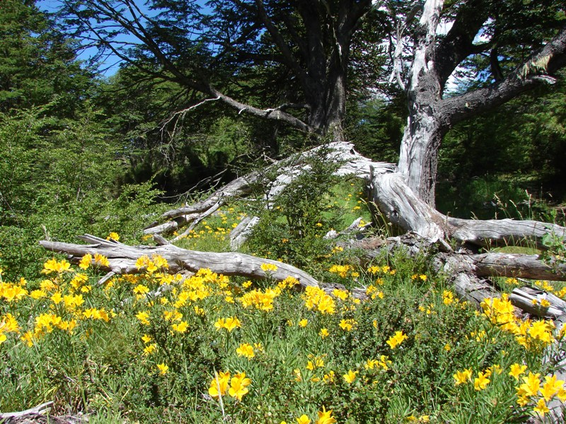 Puesco, Parque Nacional Villarrica.